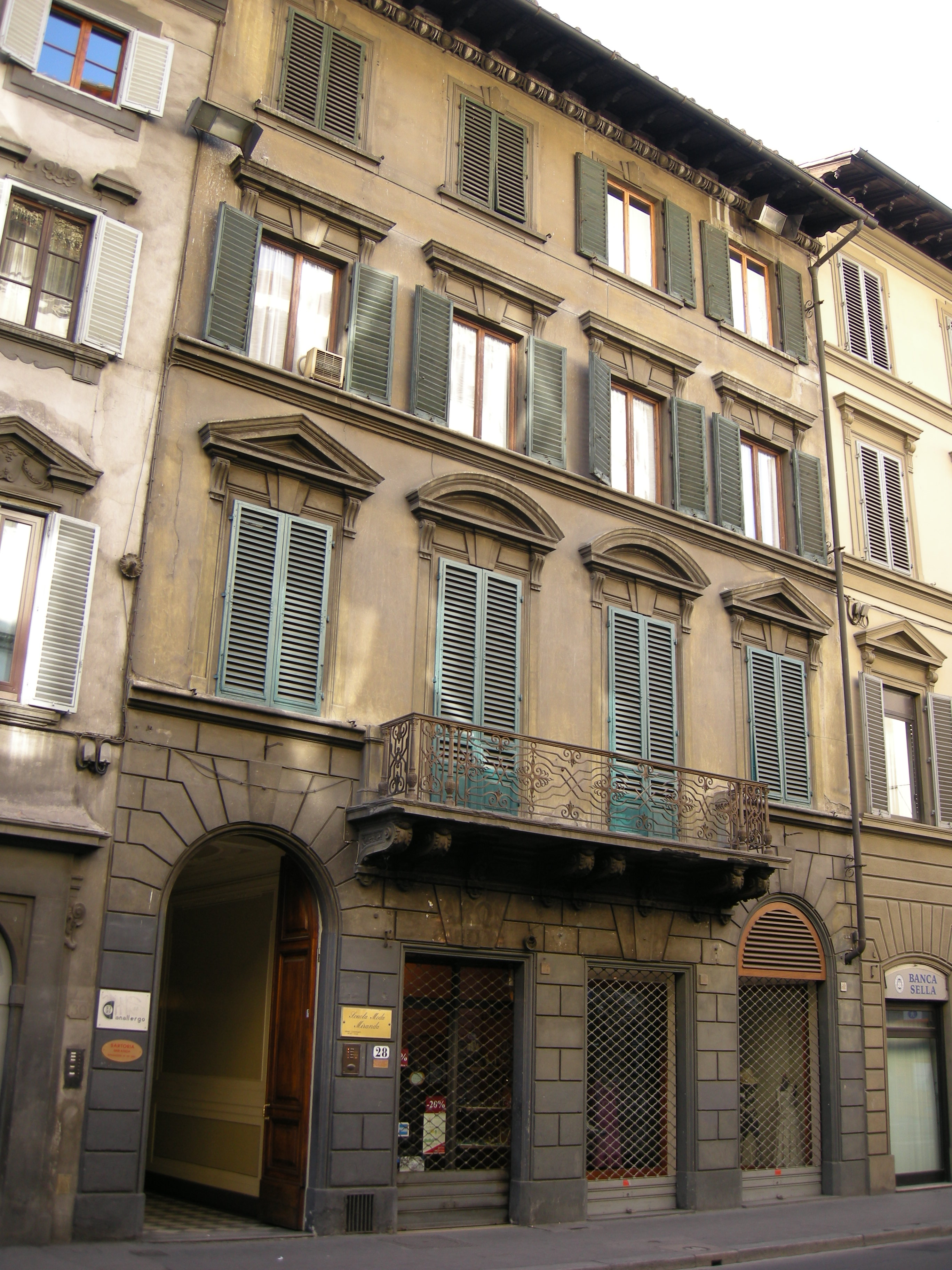 Via cavour 28, casa di spadolini